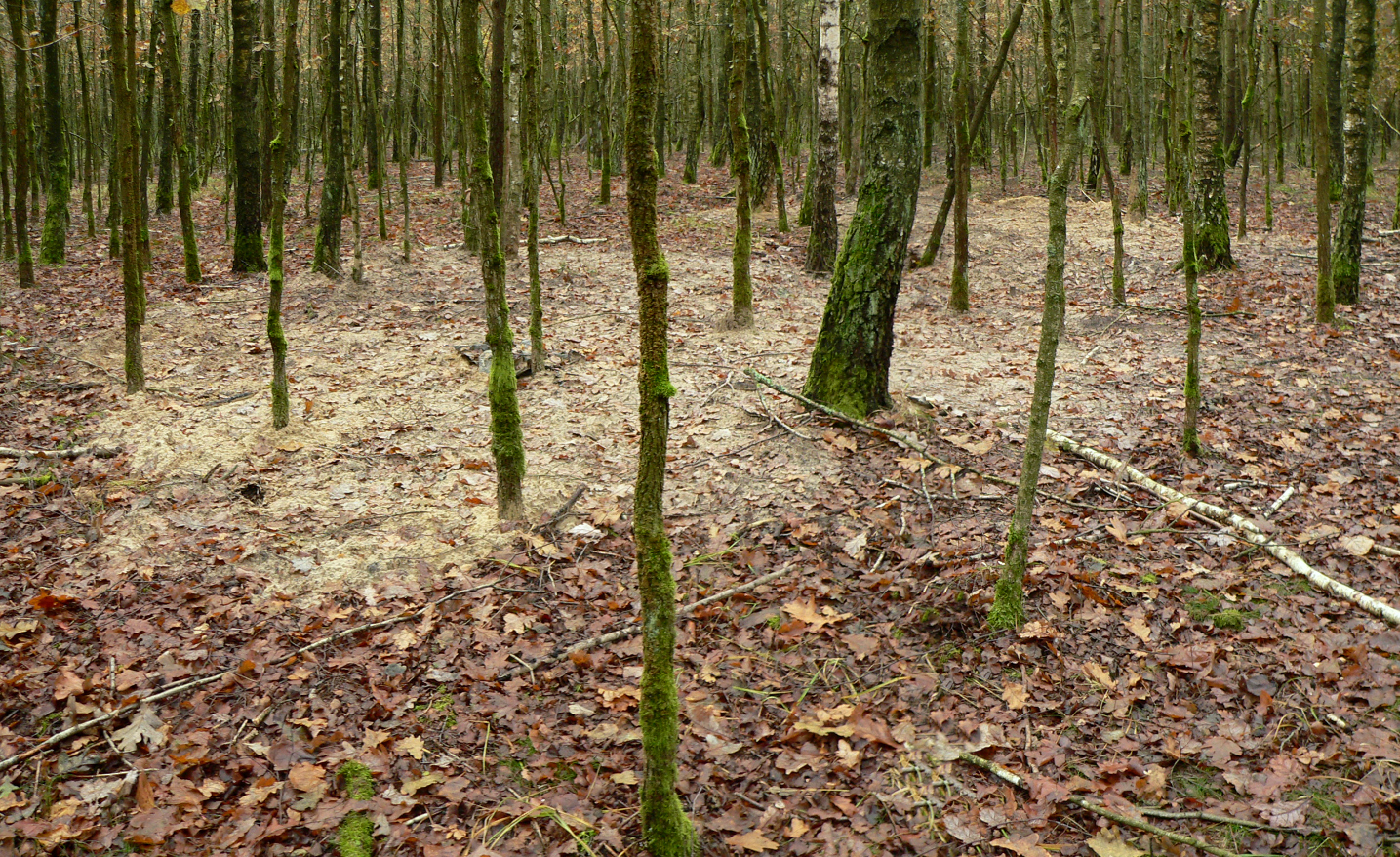 Ausgrabung der Republik Freies Wendland, nach den Ausgrabungen verfüllter Grabungssschnitt am Standort des Hüttendorfes der Republik Freies Wendland